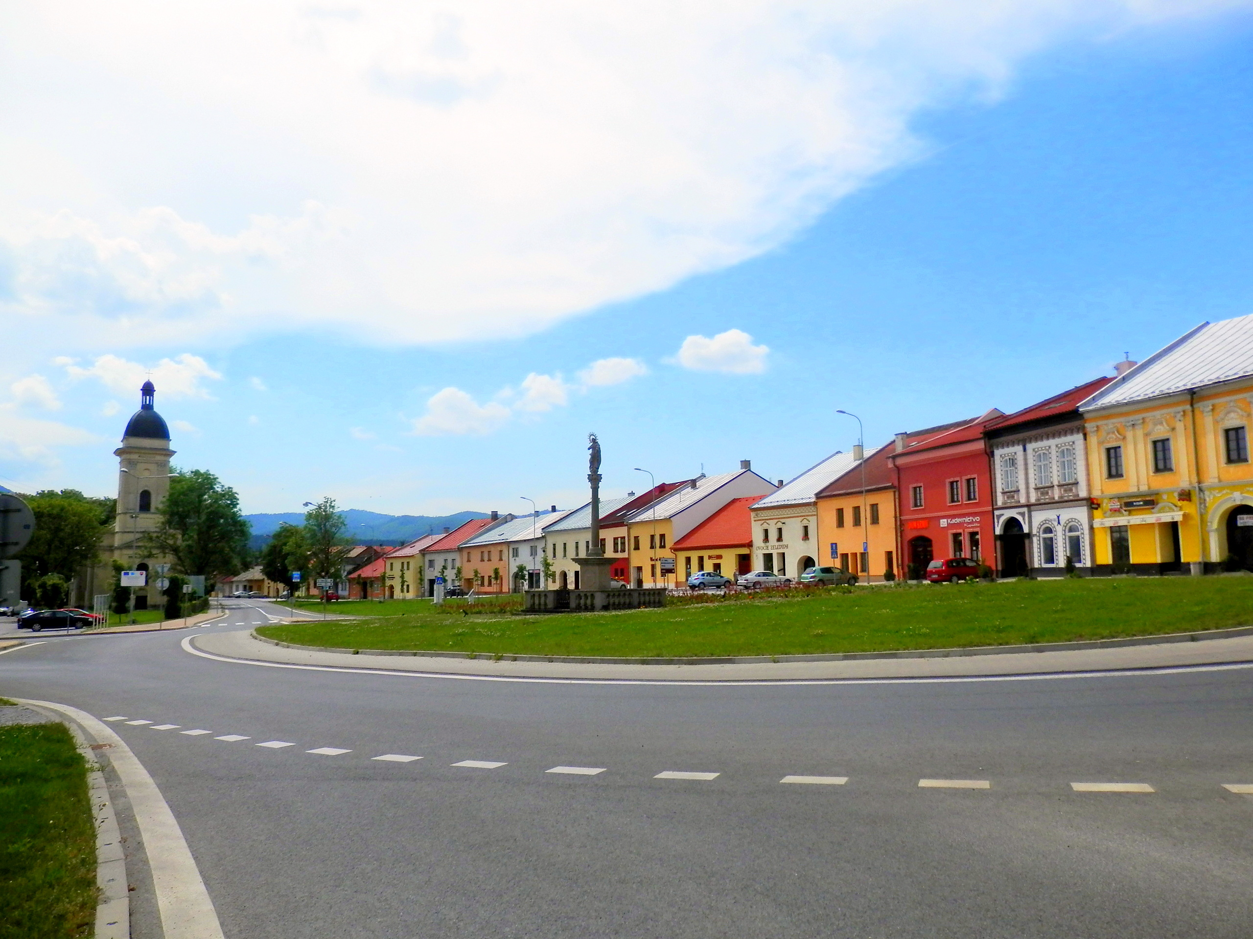 Mesto Spišské Vlachy. Okres Spišská Nová Ves.